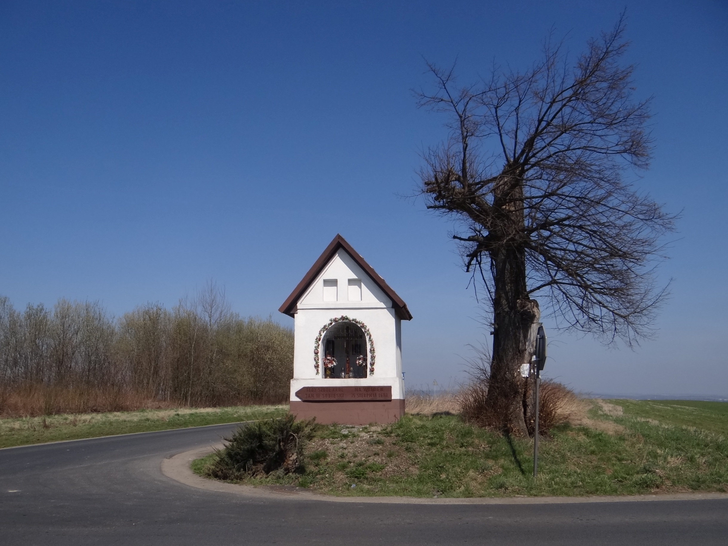 Kapliczka w Rącznej przy skrzyżowaniu dróg